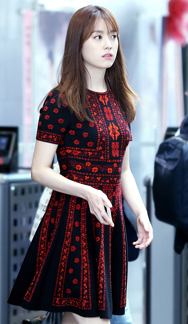 160718 한효주 이종석 W 제작발표회